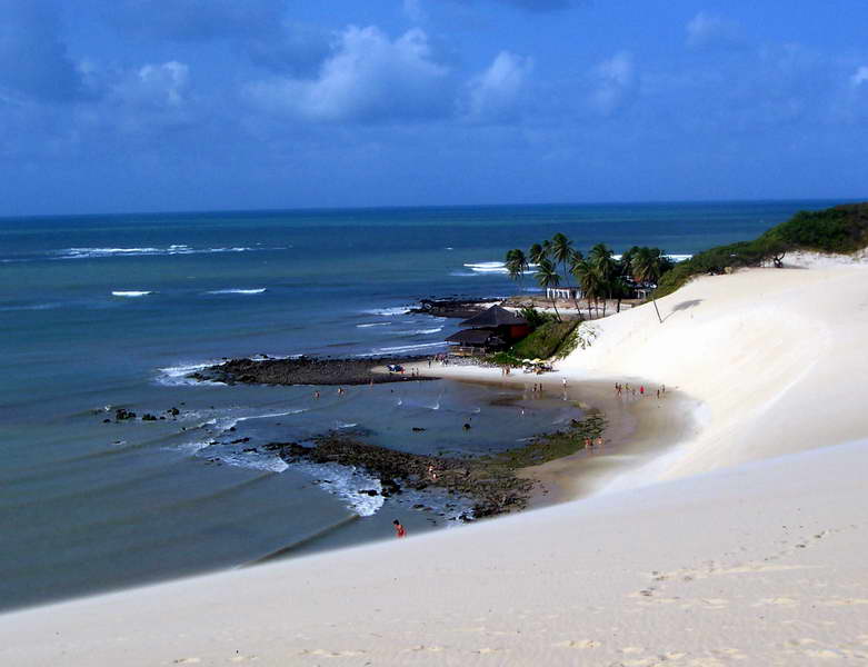 Natal (Rio Grande do Norte), Brasil. Praia de Genipabu. Natal (Rio Grande do Norte), Brazil. Beach of Genipabu. Copyright © 2005 Gerardo Valente. Self made, August/2005 (Gerardo Valente)